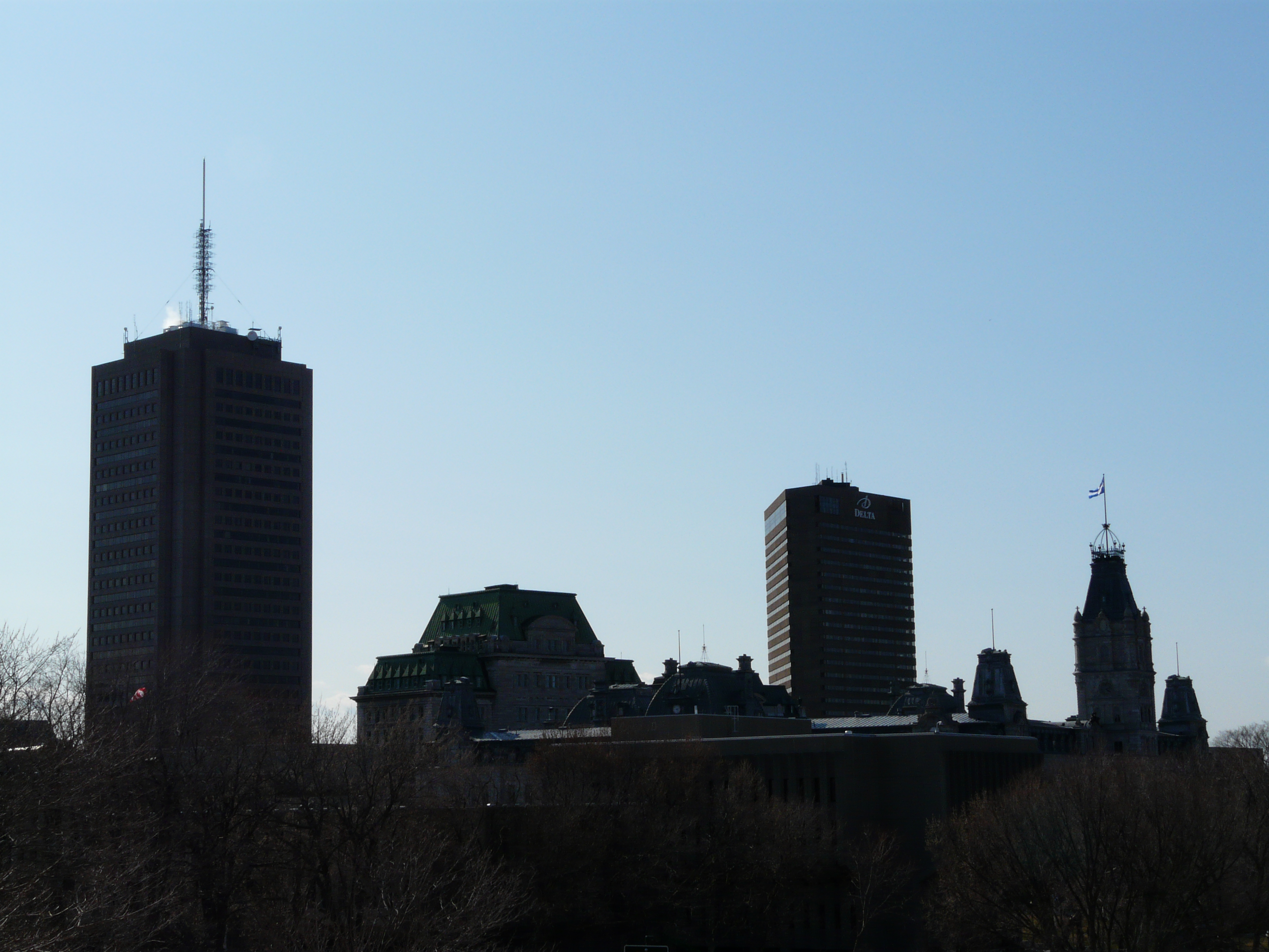 Silouhette de la colline parlementaire à Québec, quartier Vieux-Québec—Cap-Blanc—colline Parlementaire.